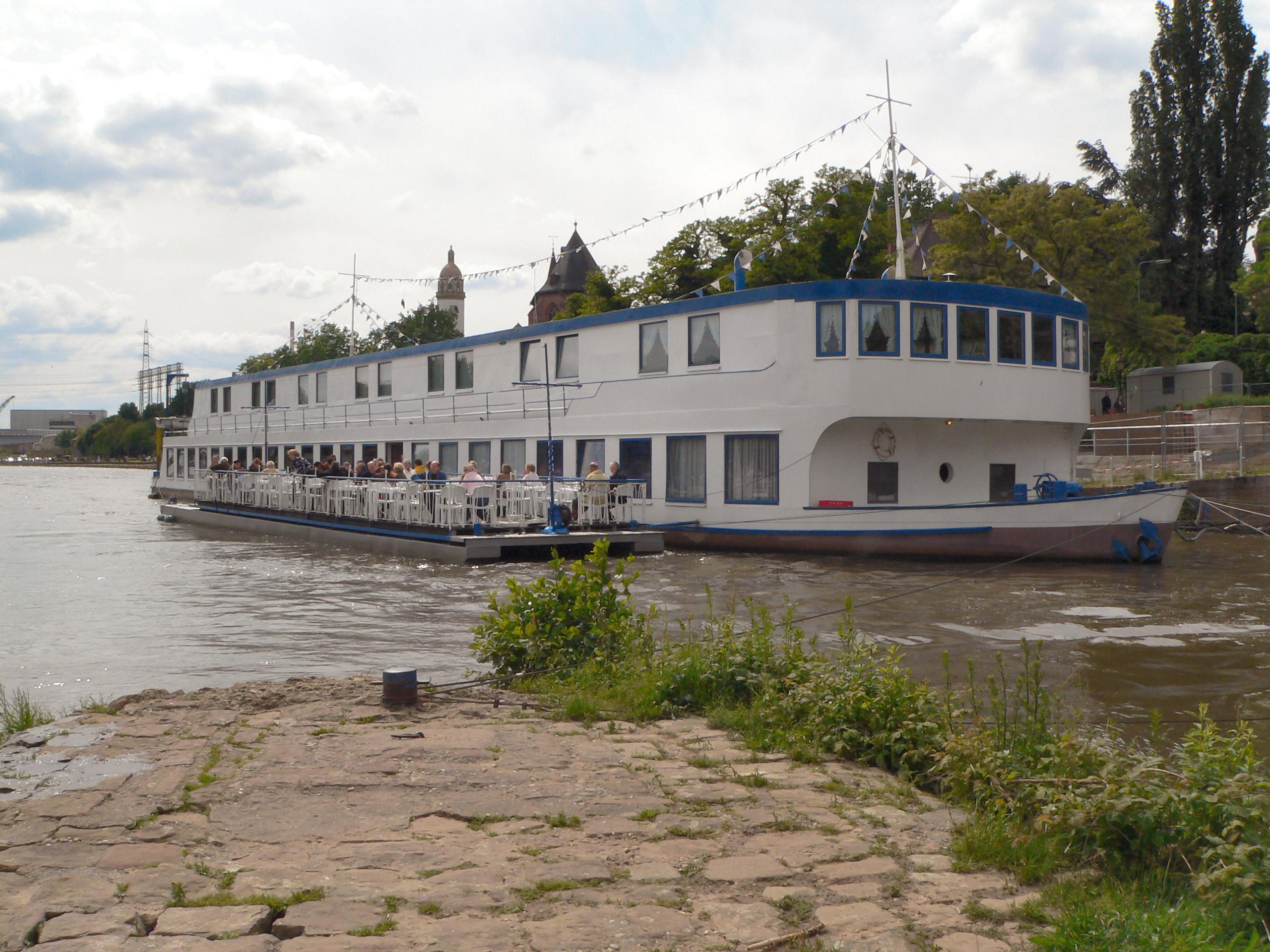 Hotelschiff „Peter Schlott“ mit Freisitz-Ponton in Frankfurt-Höchst